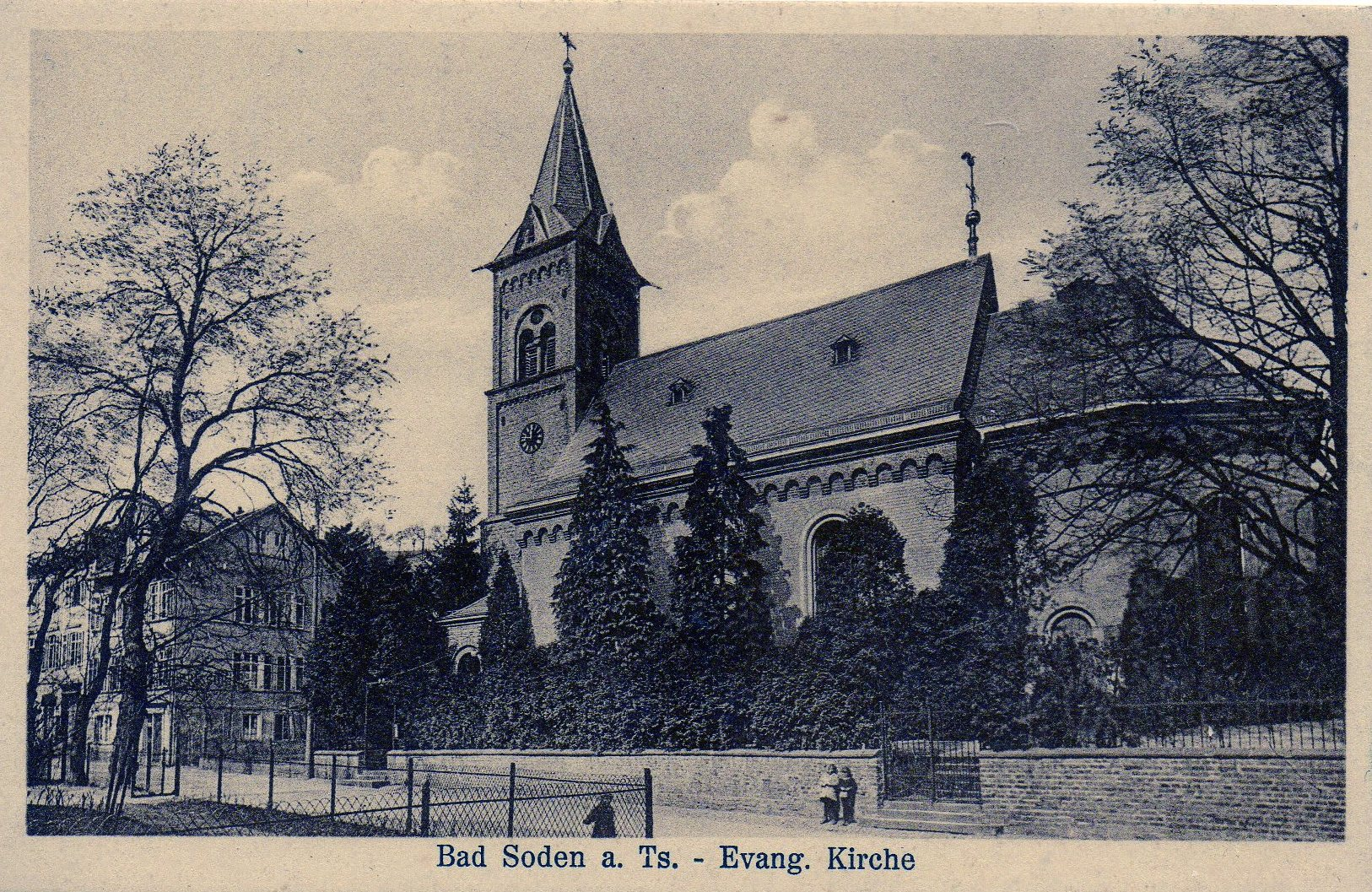 Alte Postkarte der Evangelischen Kirche in Bad Soden/Taunus